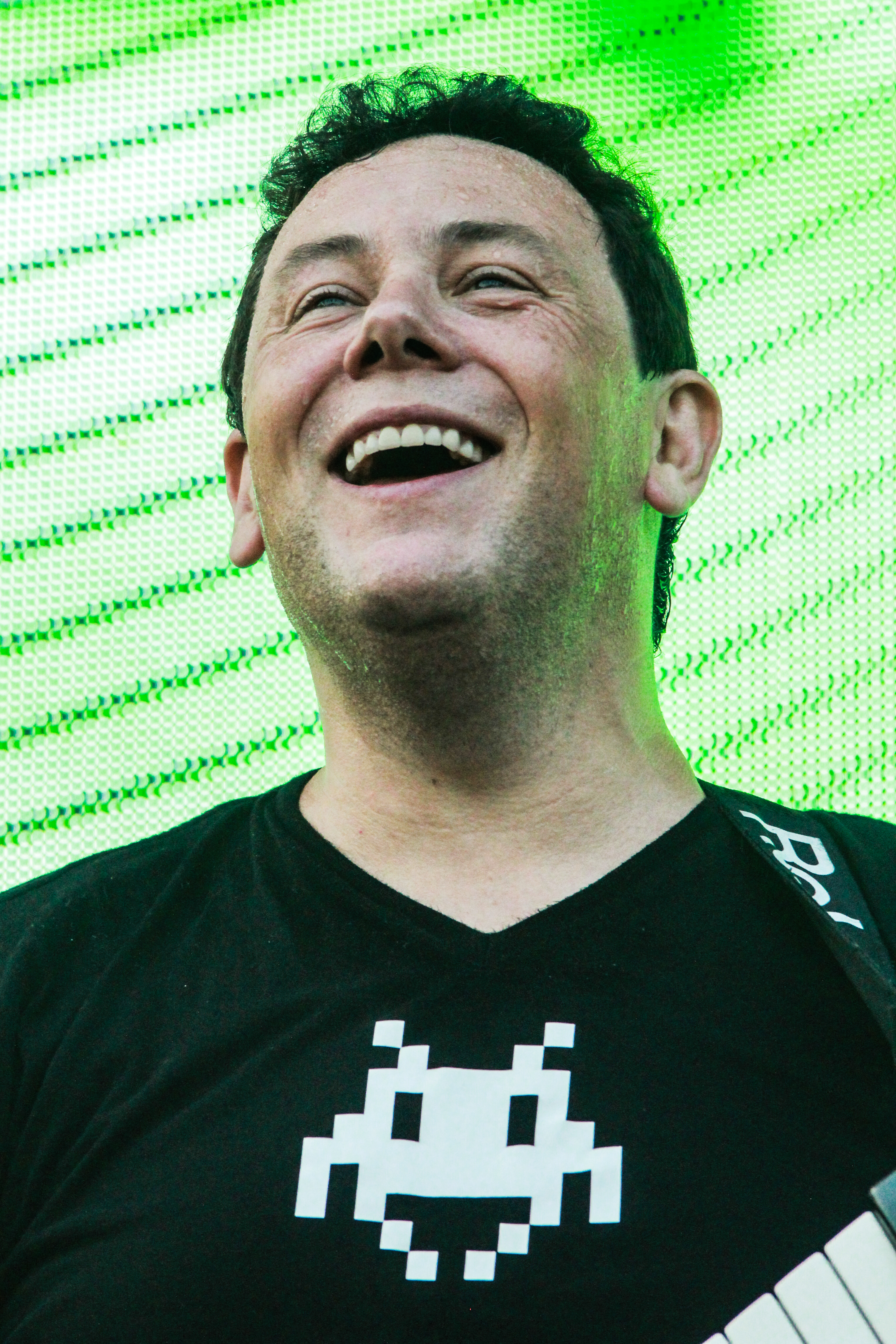 Electric Love Festival